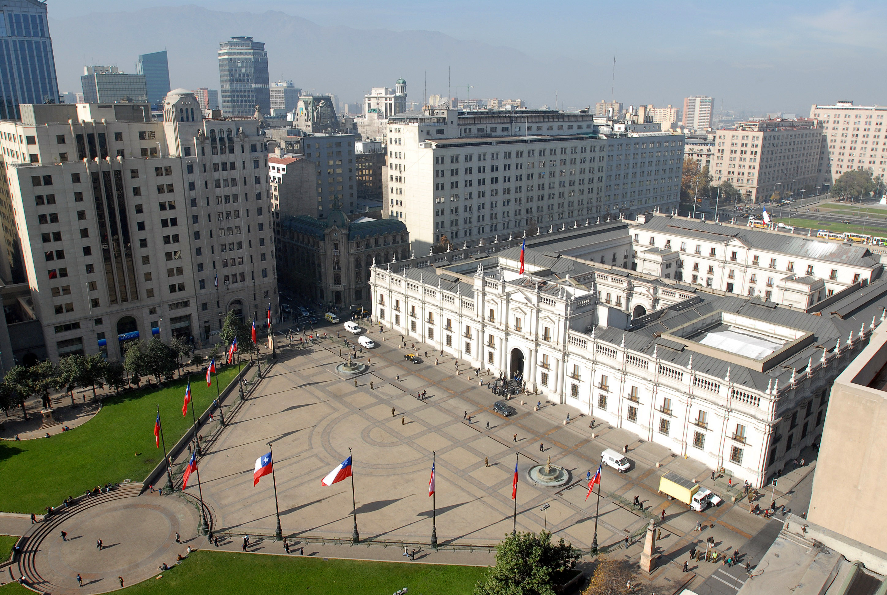 Vista del Palacio de La Moneda desde el Ministerio de Hacienda.